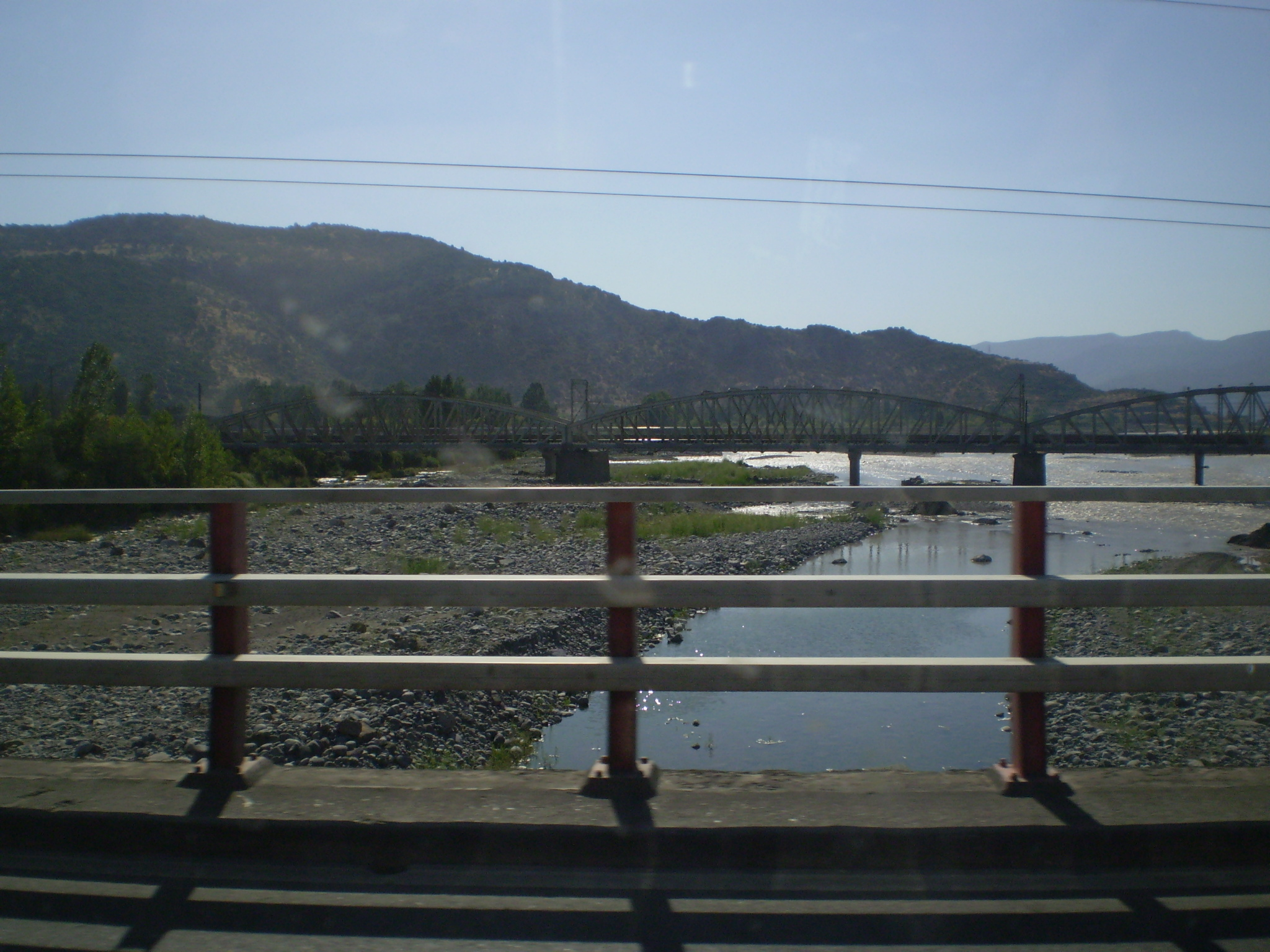 Es un aporte a Wikipedia con la foto del Tinguiririca.